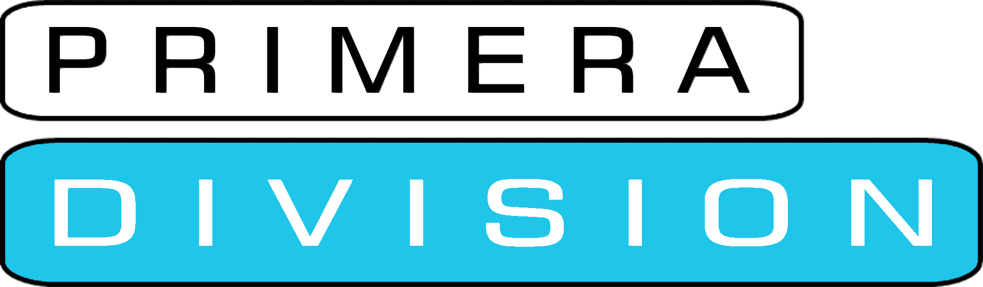 Imagen no oficial representativa de la Primera División de Argentina